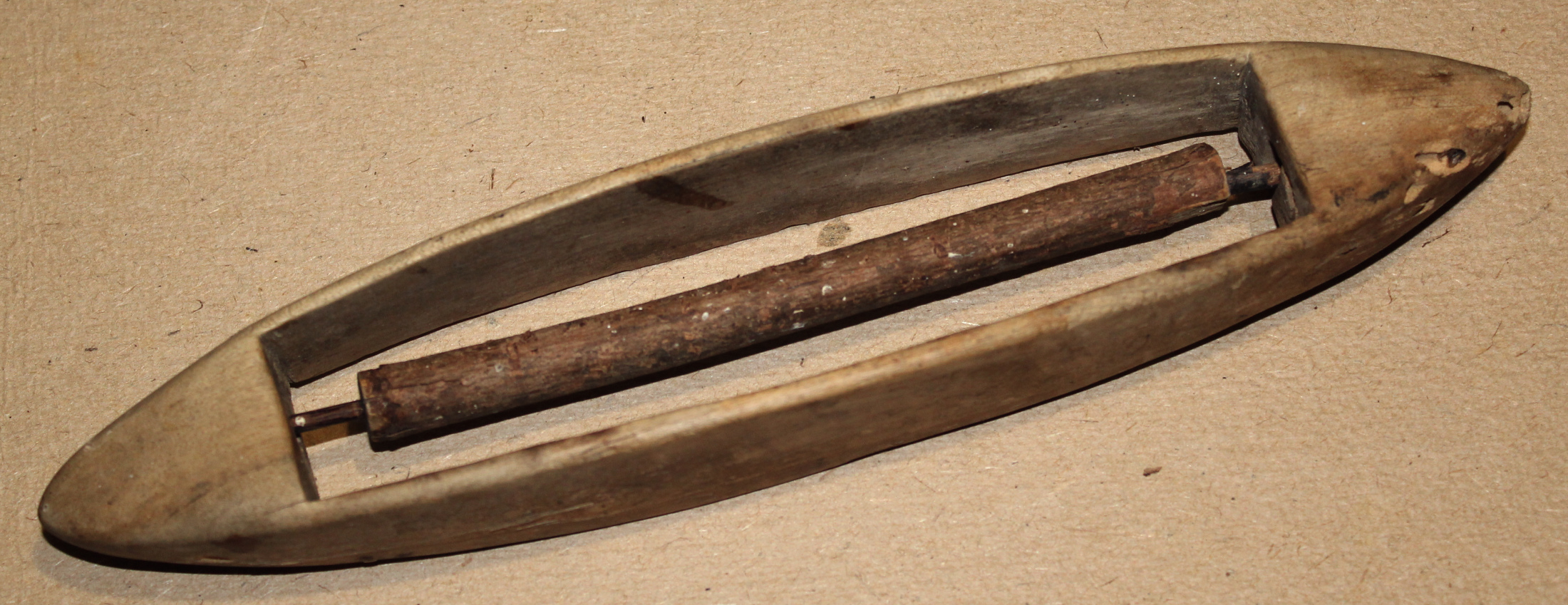 Челнок ручного ткацкого станка со шпулькой. Изготовлен из берёзы. Середина XX века. Витебская область. Белоруссия.